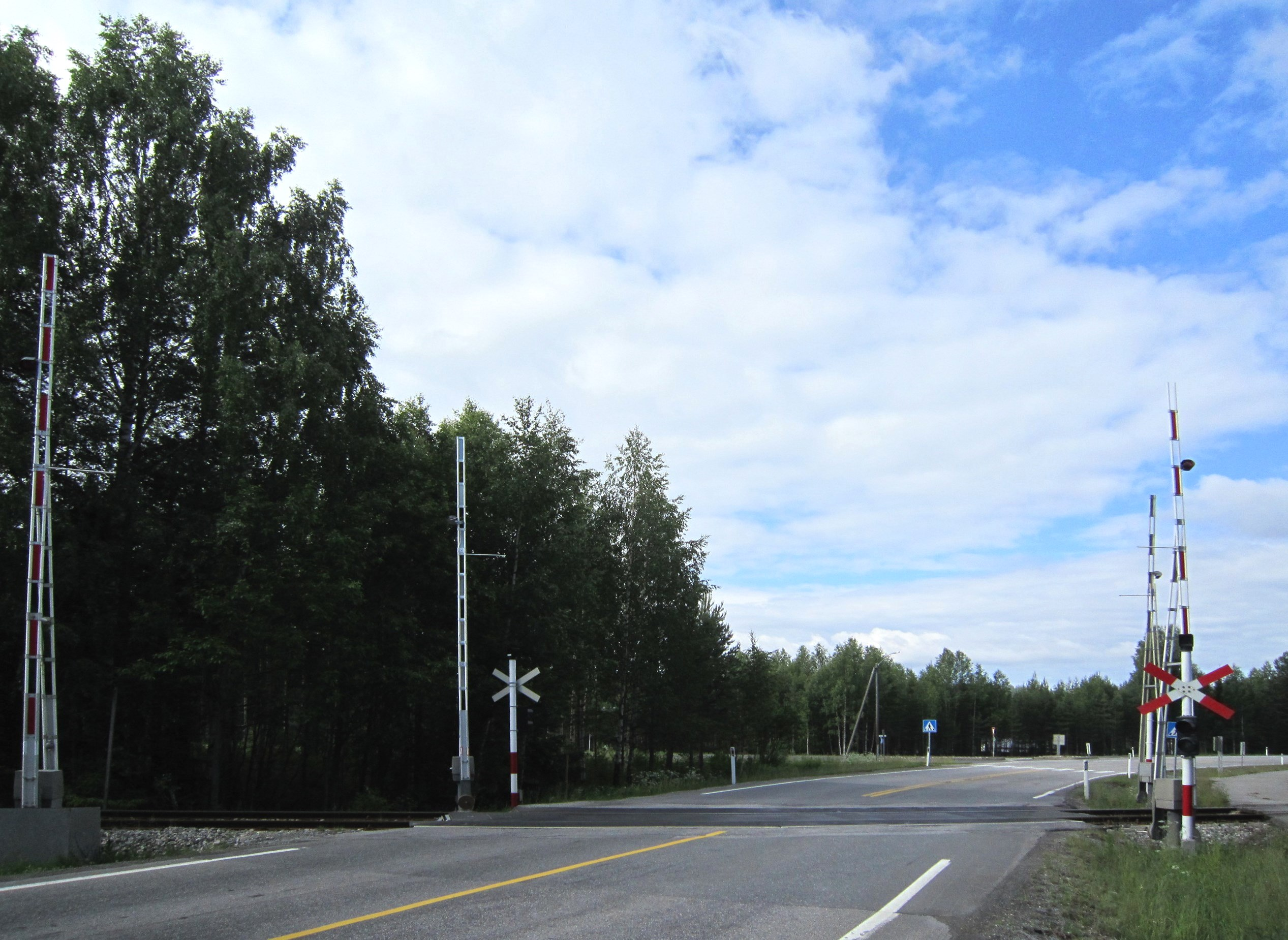 Riksvei 2 krysser Solørbanen ved Jømna.